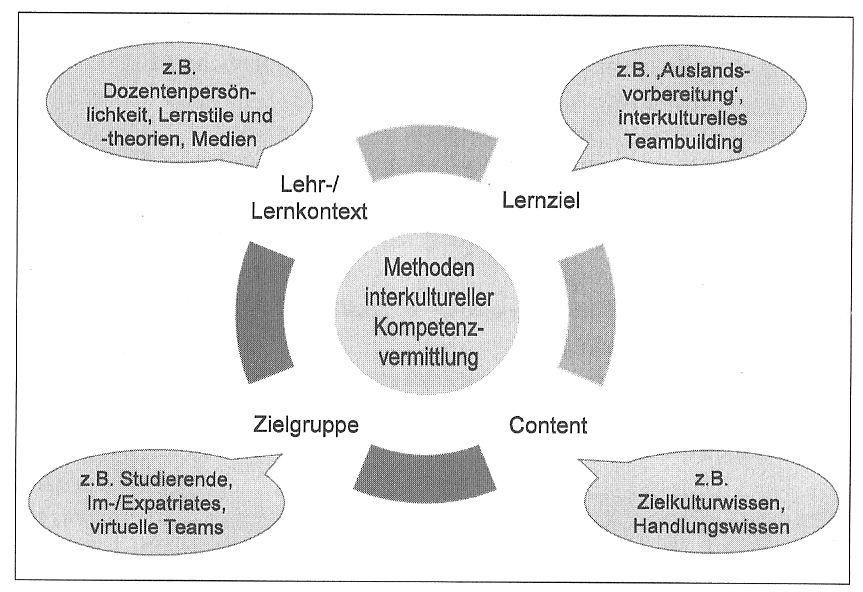 Interkulturelle Personalentwicklung: Methoden im Spannungsfeld ihrer Bedingungsfaktoren